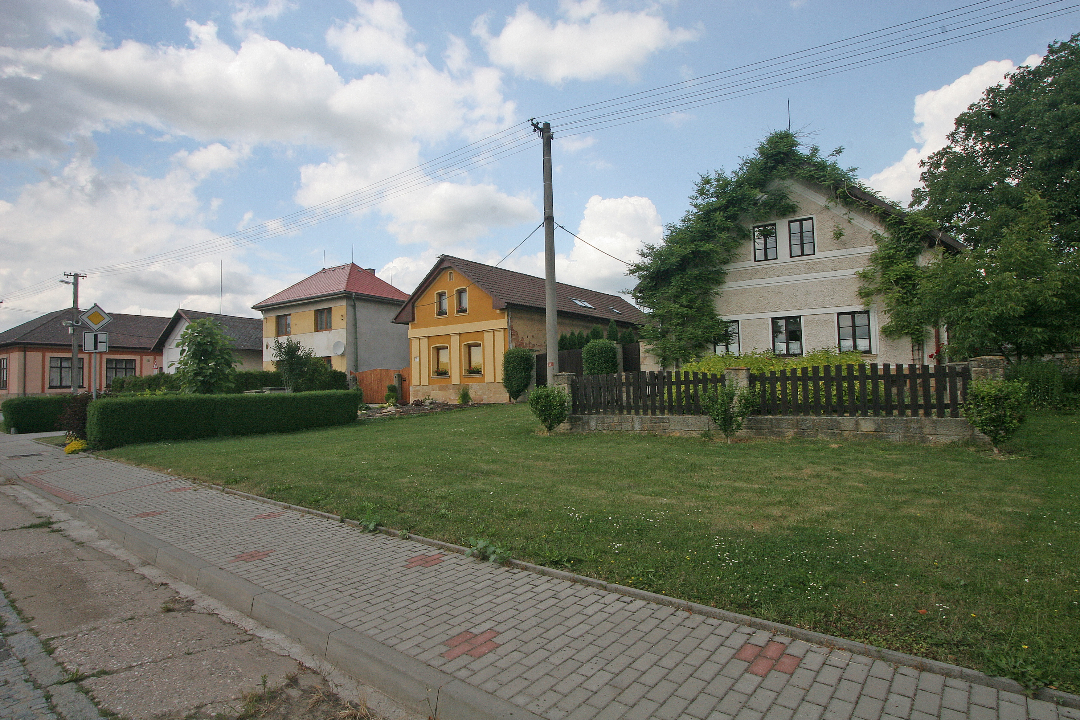 Třebnouševes čp. 12